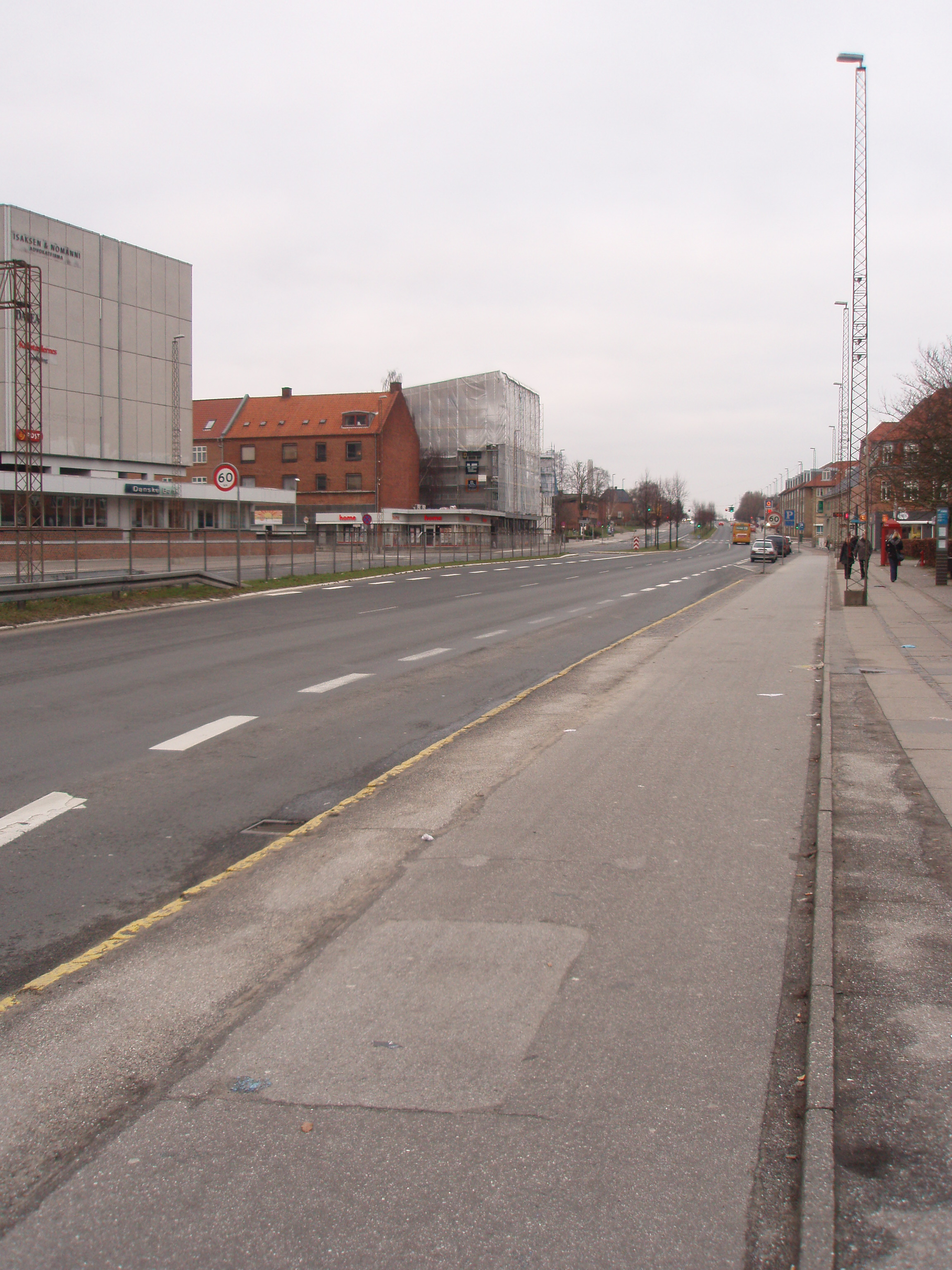 Skanderborgvej (Århus)